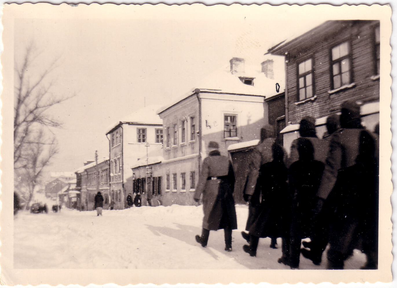 Беларуская (тарашкевіца): Менск (Miensk), Траецкае прадмесьце (Trajeckaje pradmieściе)